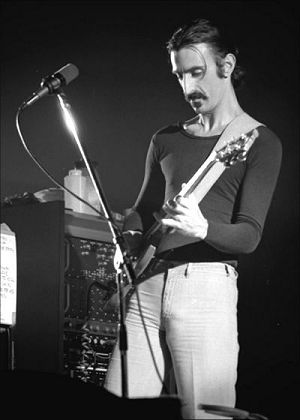 Frank Zappa, Ekeberghallen, Oslo, Norway